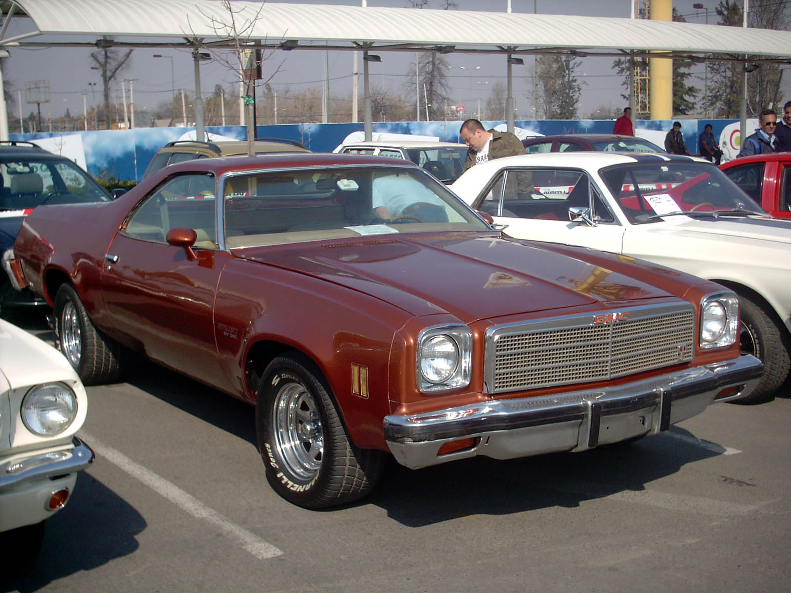 1974 GMC Sprint